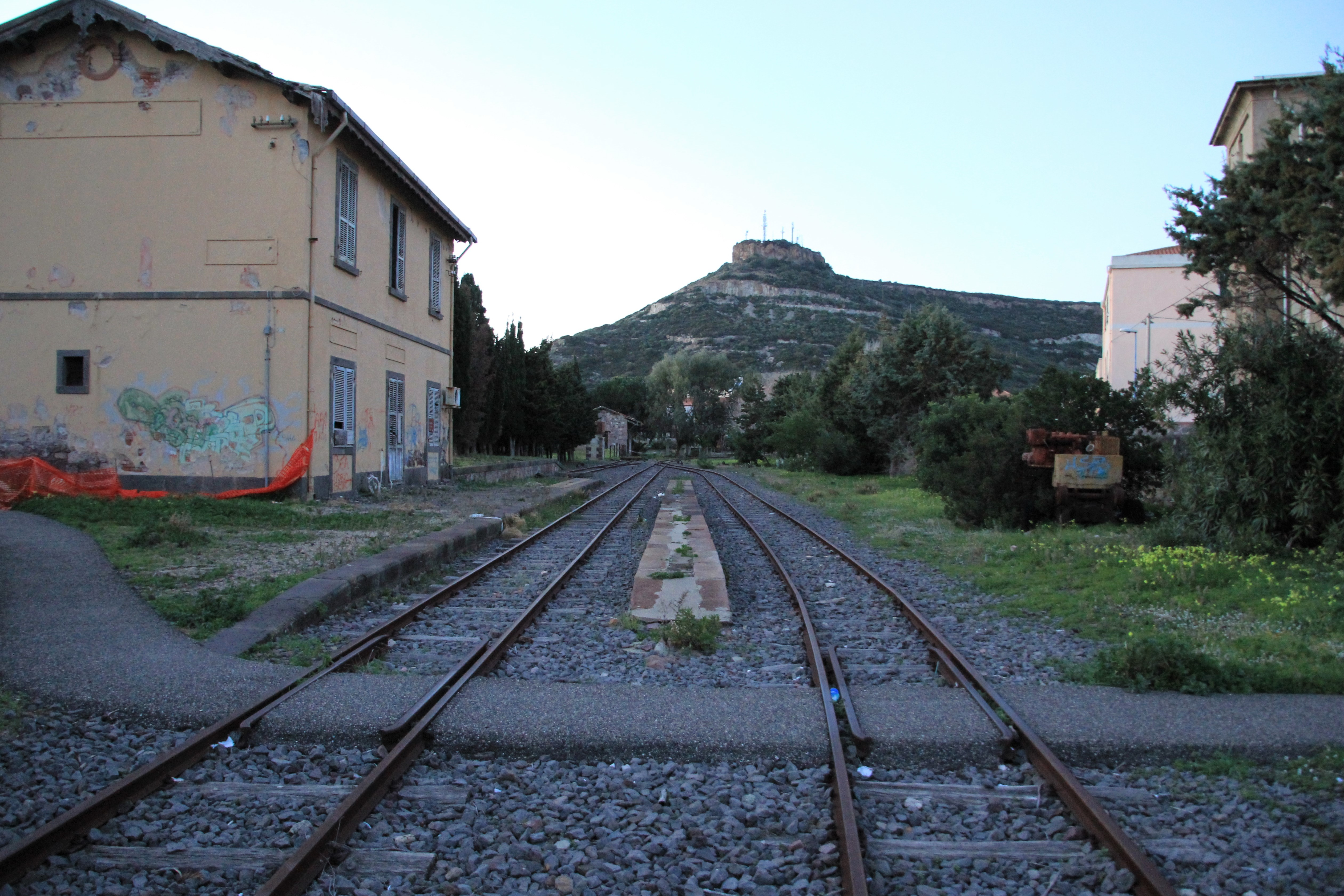 Bosa, stazione ferroviaria di Bosa Marina